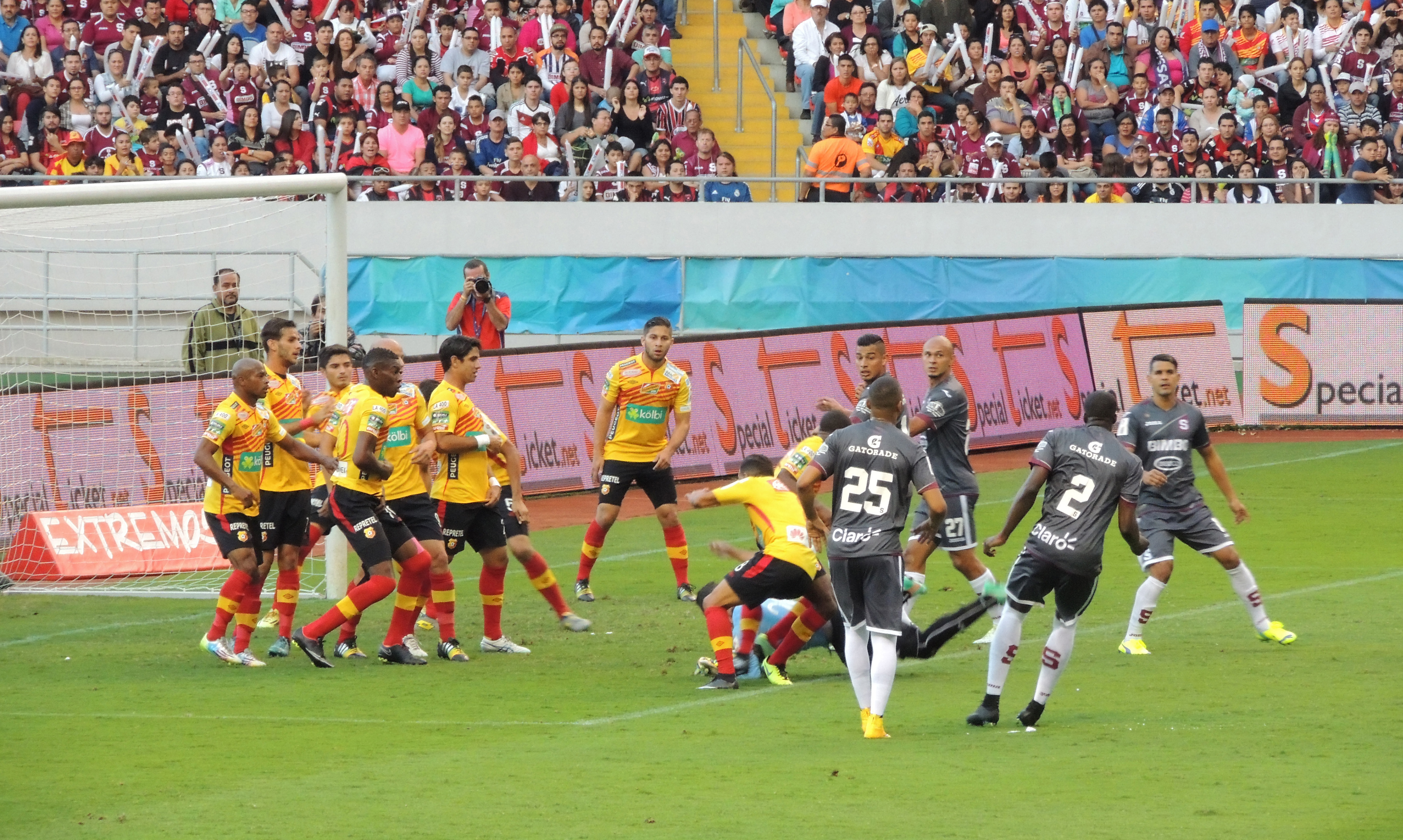 Esta obra de Luis Manuel Madrigal está bajo una licencia de Creative Commons Reconocimiento-CompartirIgual 4.0 Internacional. Para una versión sin logo escriba a